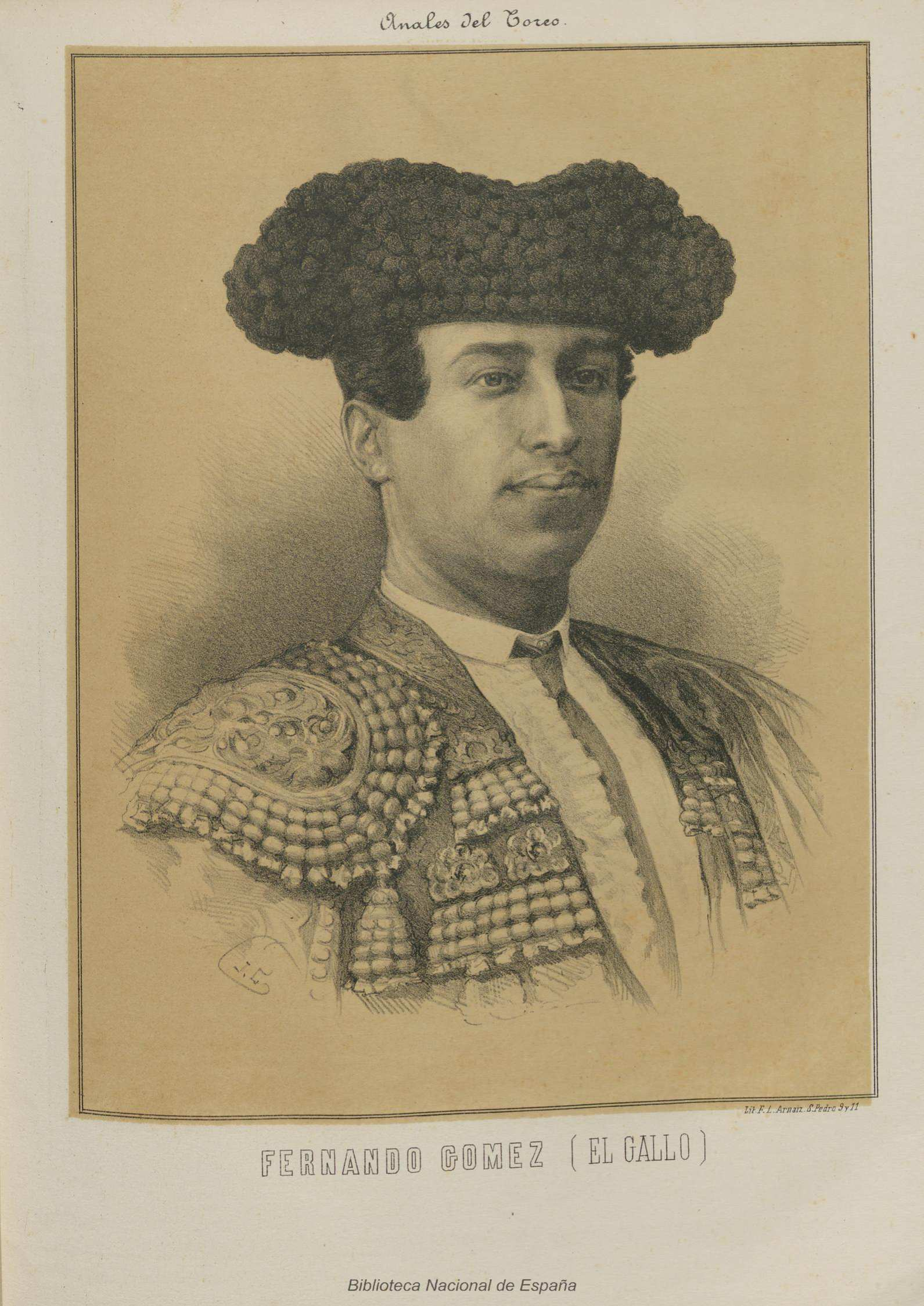 Fernando Gómez el Gallo, litografía de J. Cuevas. ilustración de Anales del toreo : reseña histórica de la lidia de reses bravas : galería biográfica de los principales lidiadores: razón de las primeras ganaderías españolas, sus condiciones y divisas obra escrita por José Velázquez y Sánchez; e ilustrada por reputados artistas, Madrid, 1888.